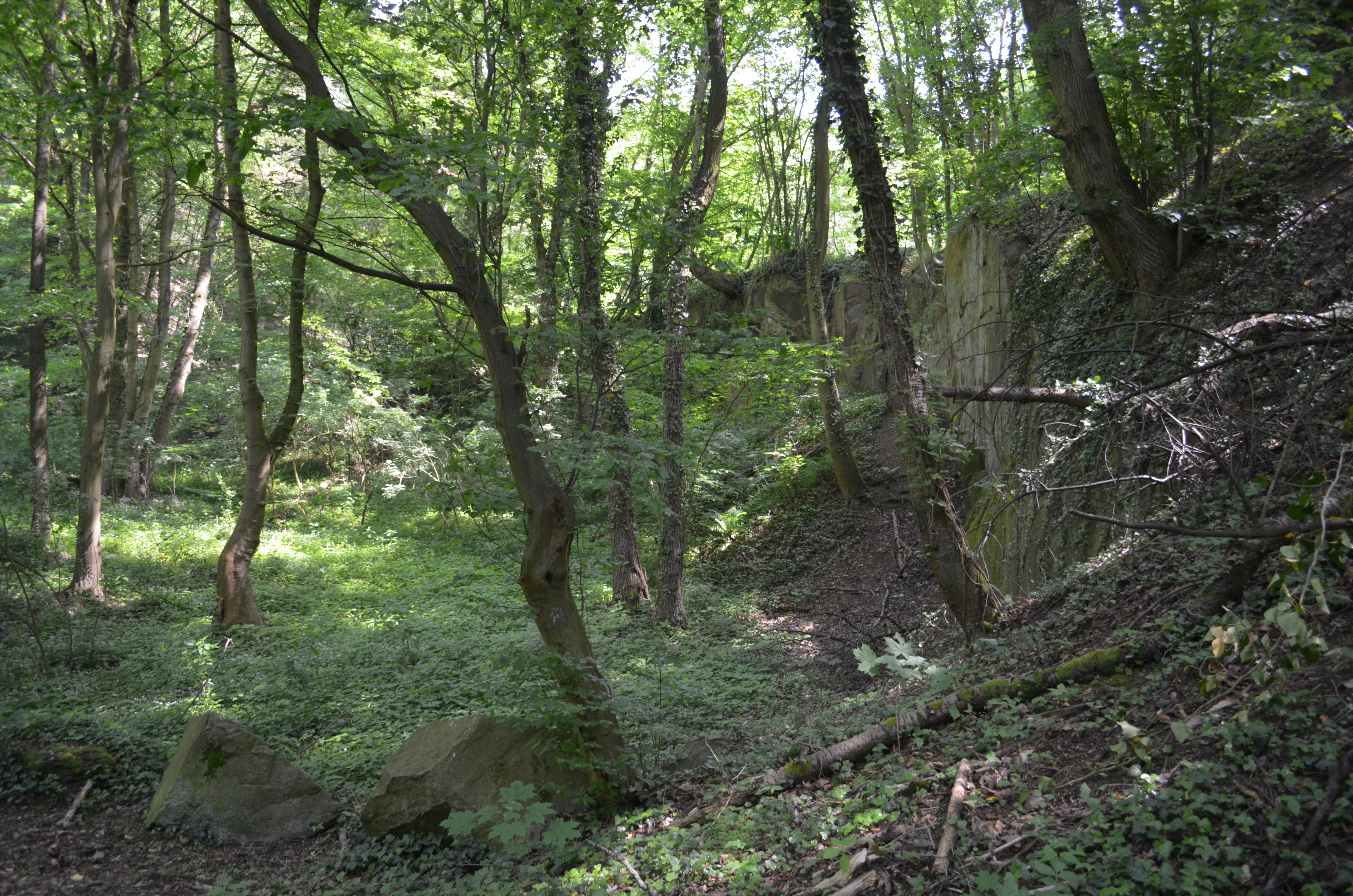 Orbishöhe von Auerbach und Zwingenberg